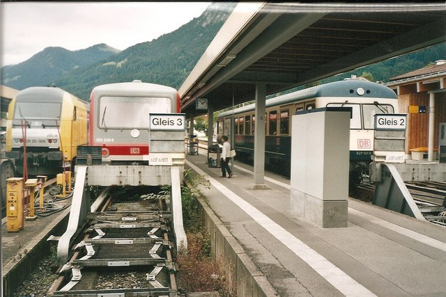 Oberstdorf Hauptbahnhof